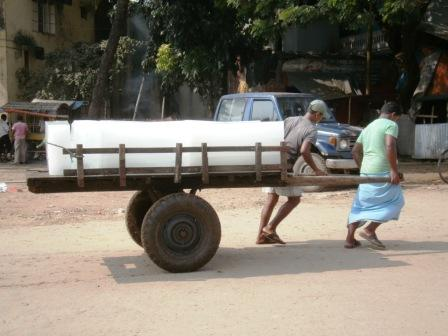 বরফ কল থেকে ঠেলায় করে মাছ সংরক্ষণের জন্য বরফ নিয়ে আসা হচ্ছে। কক্সবাজার, ২০১০